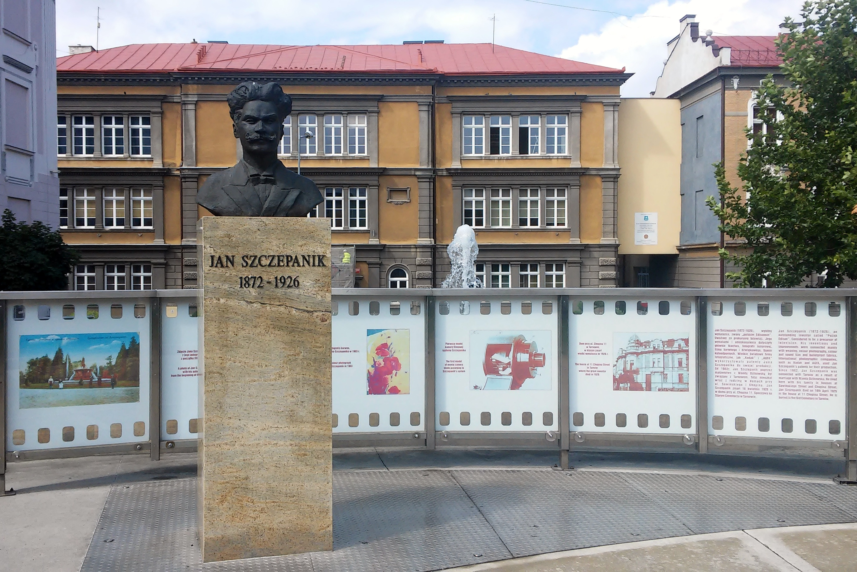 Pomnik Jana Szczepanika w Tarnowie (na placu przy skrzyżowaniu ulic Mickiewicza i Goldhammera)